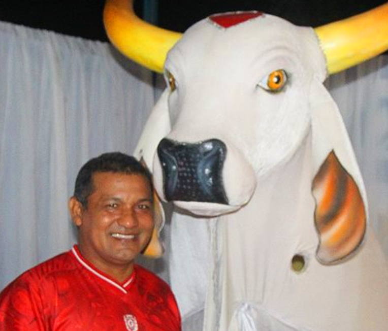 Tripa do Boi